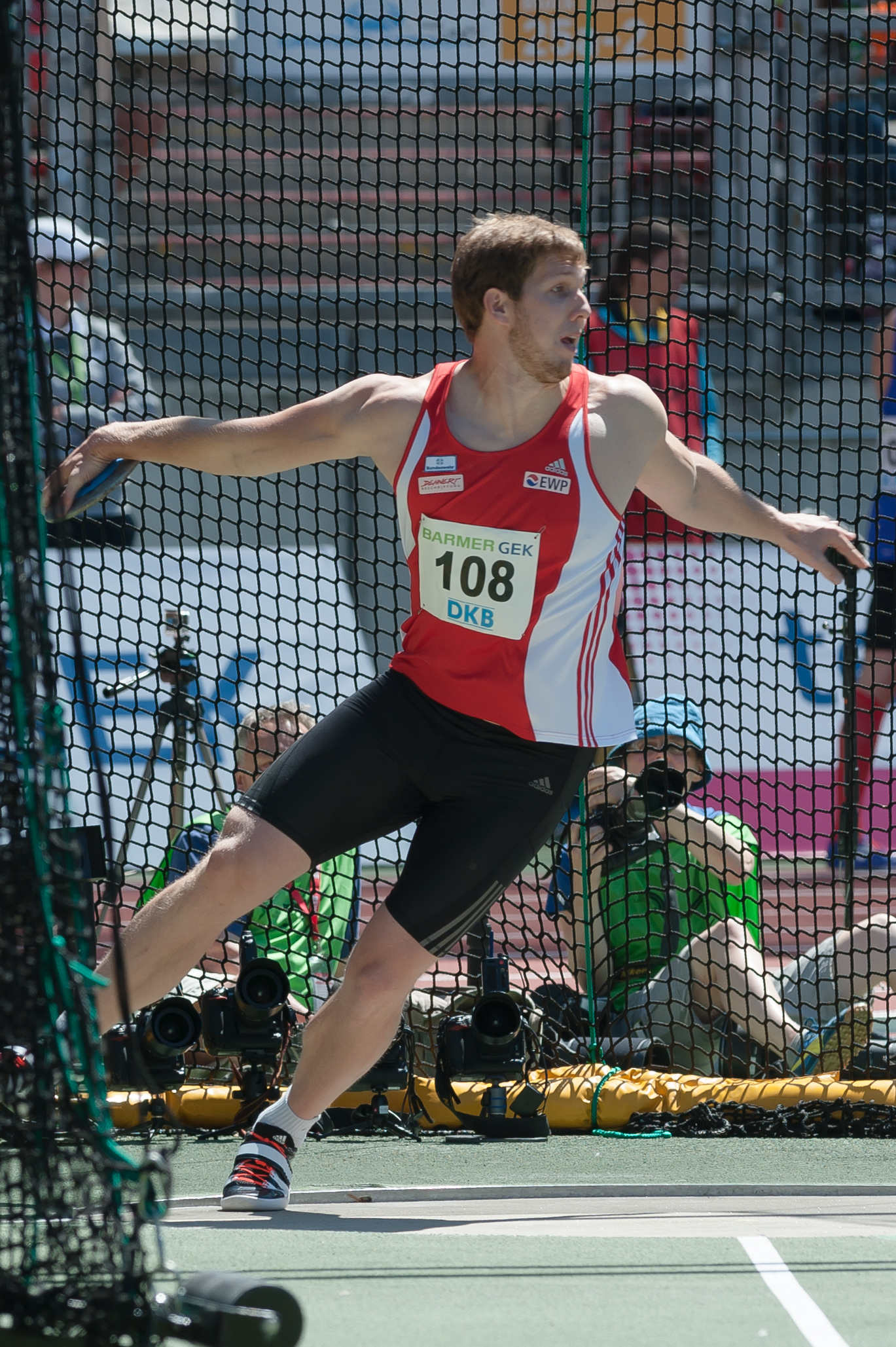 Deutsche Leichtathletik-Meisterschaften 2015: Männer Diskuswurf - Markus Münch, SC Potsdam